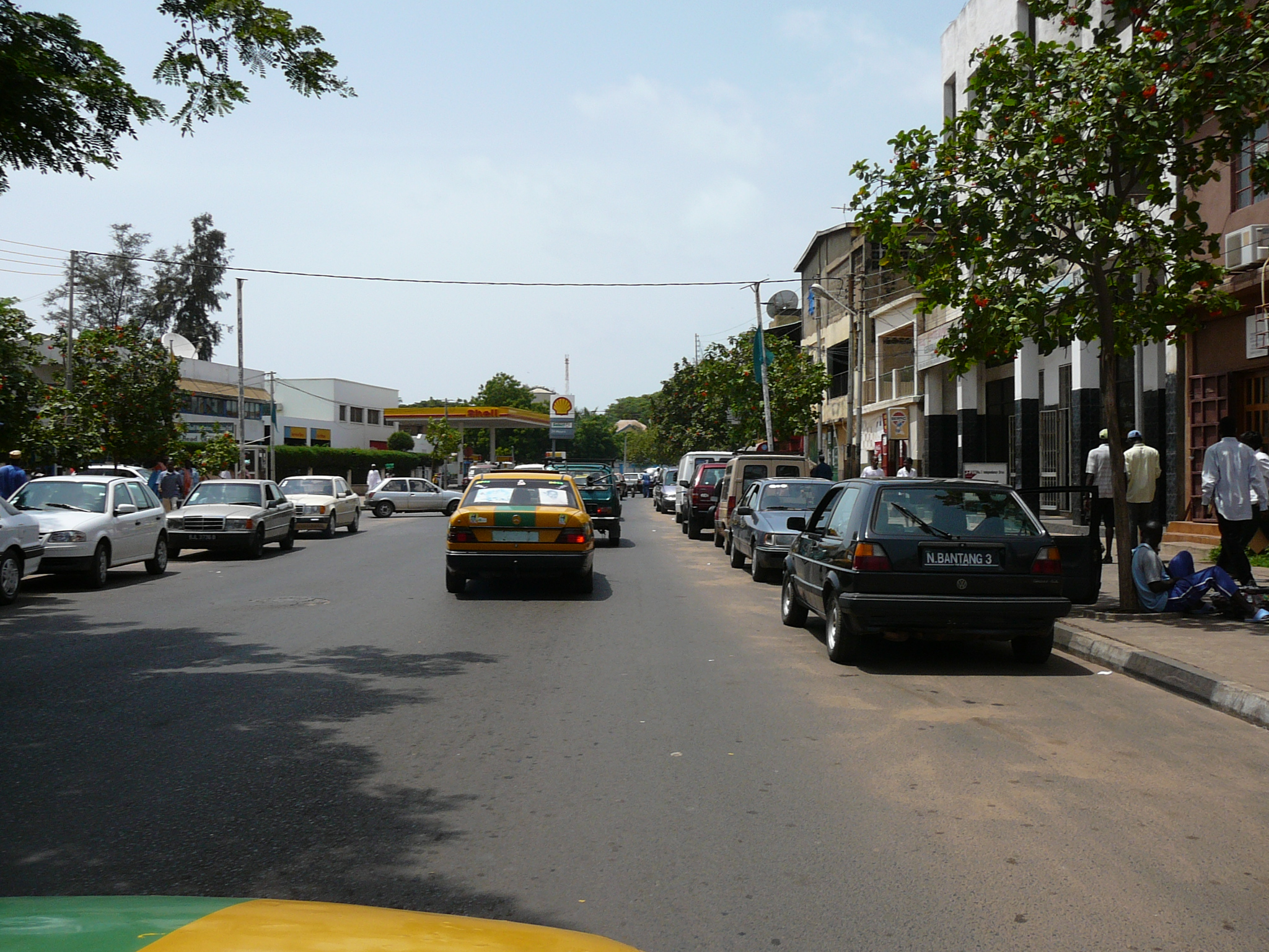 Straße in Banjul